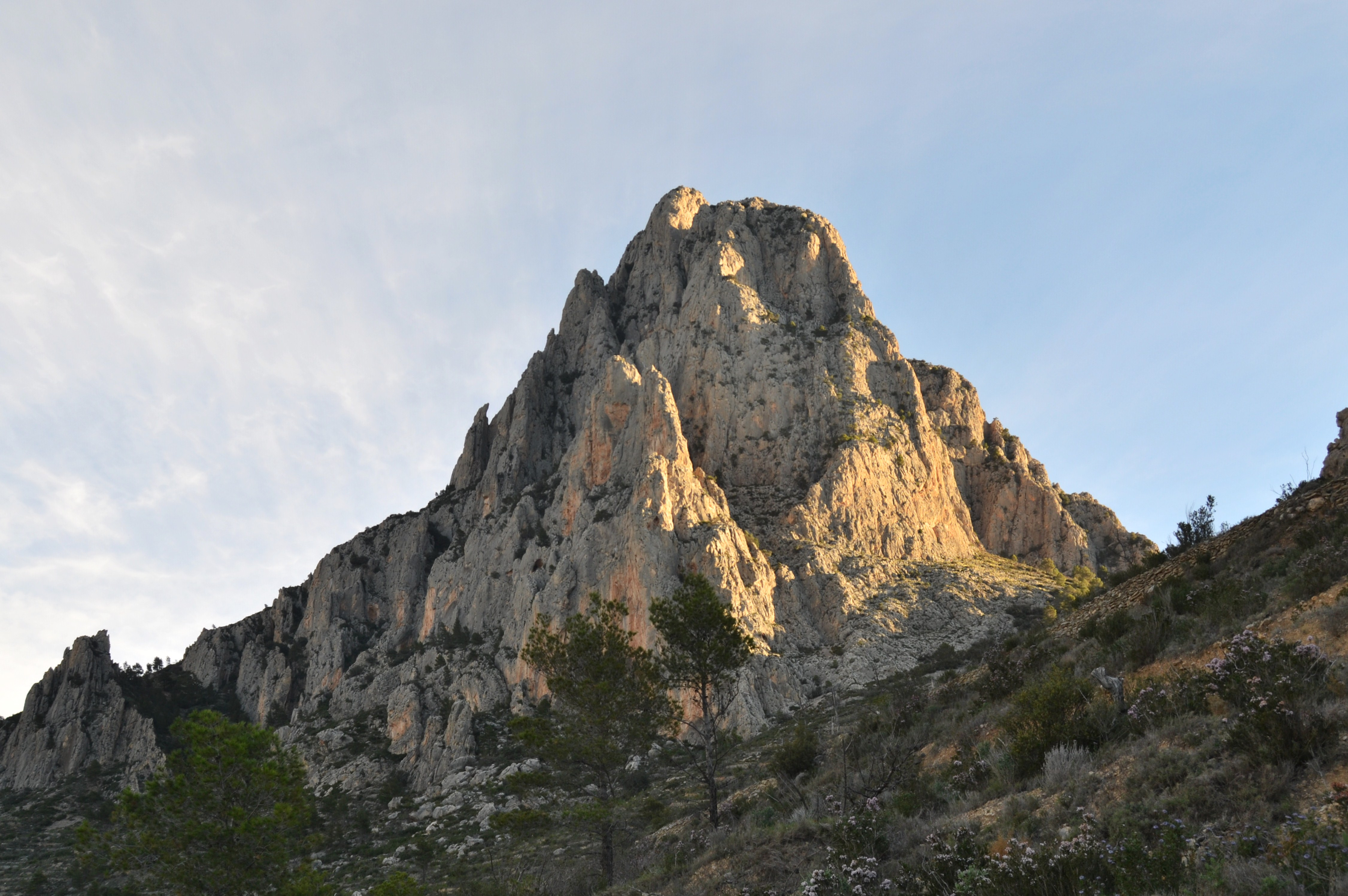 Vista del pic Prim del Puig Campana.